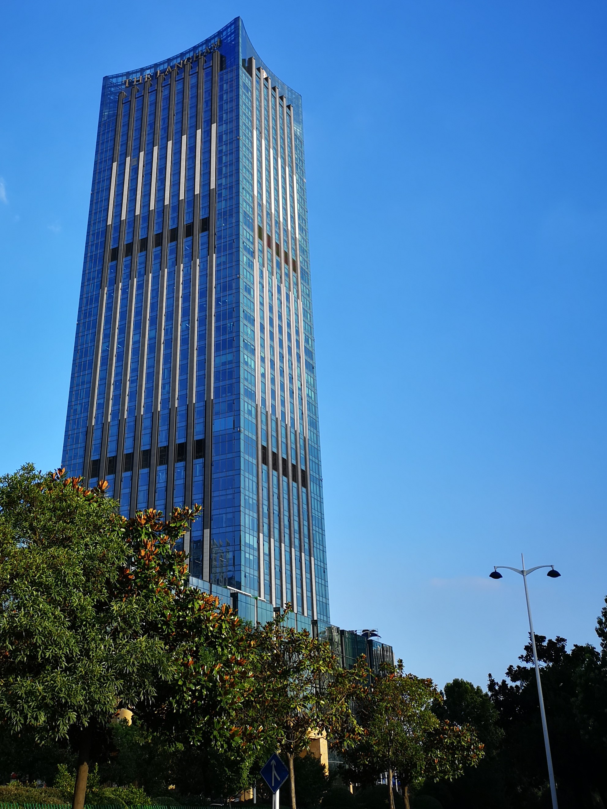 中文（中国大陆）: 合肥朗廷酒店